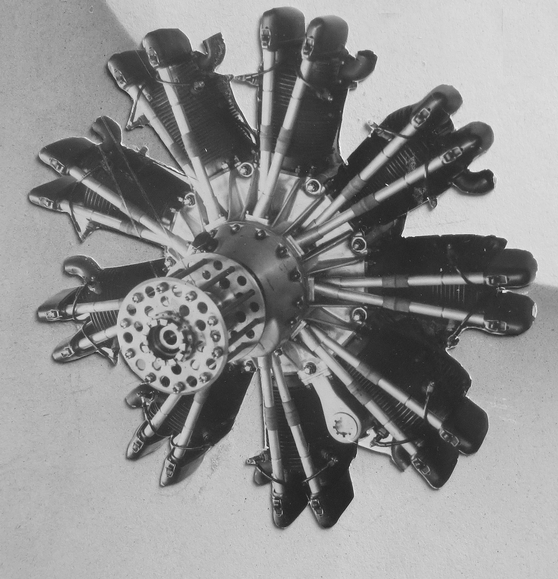 letecký motor Walter Pollux (1932)